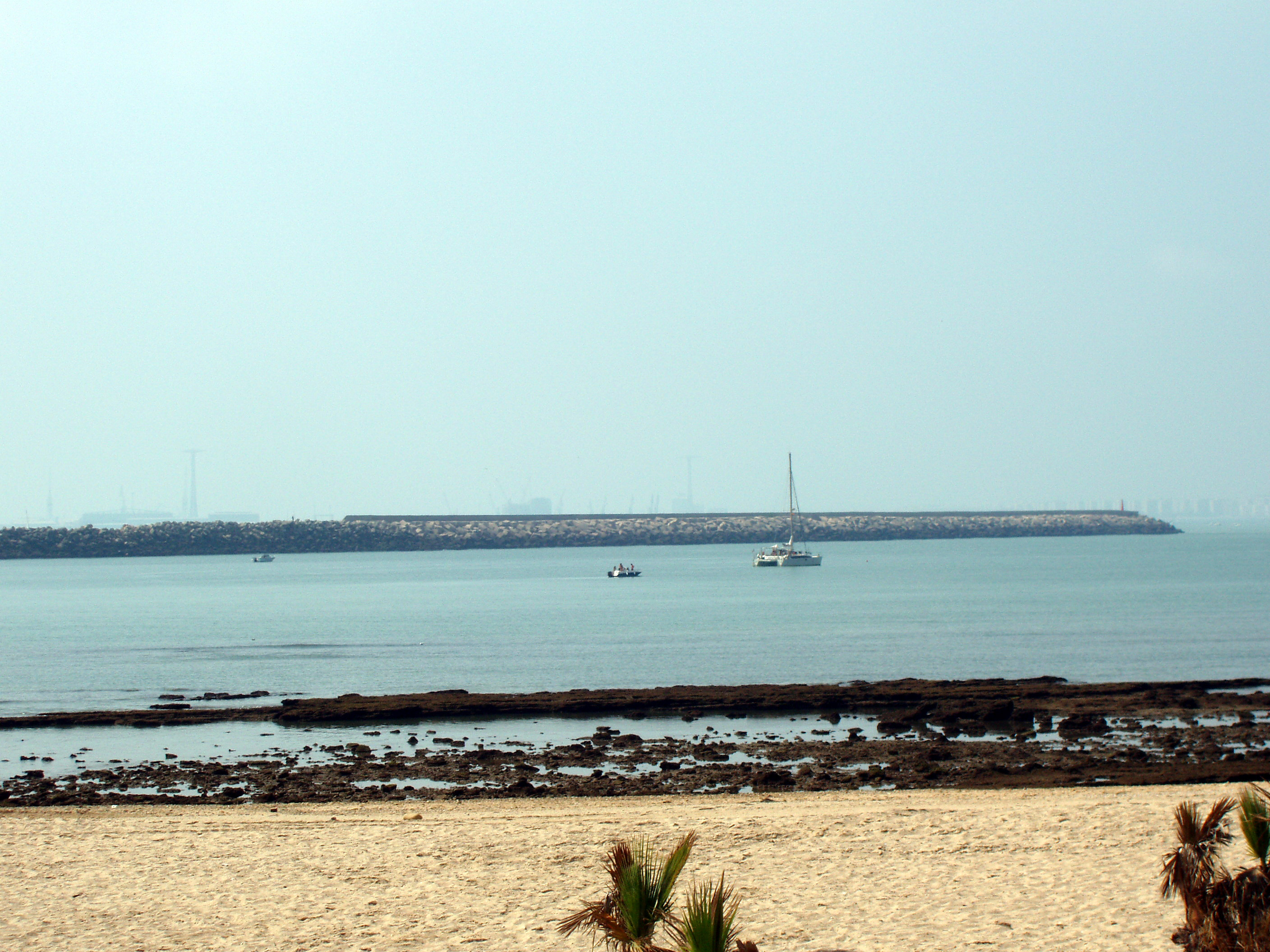 Playa de la Puntilla, en El Puerto de Santa María